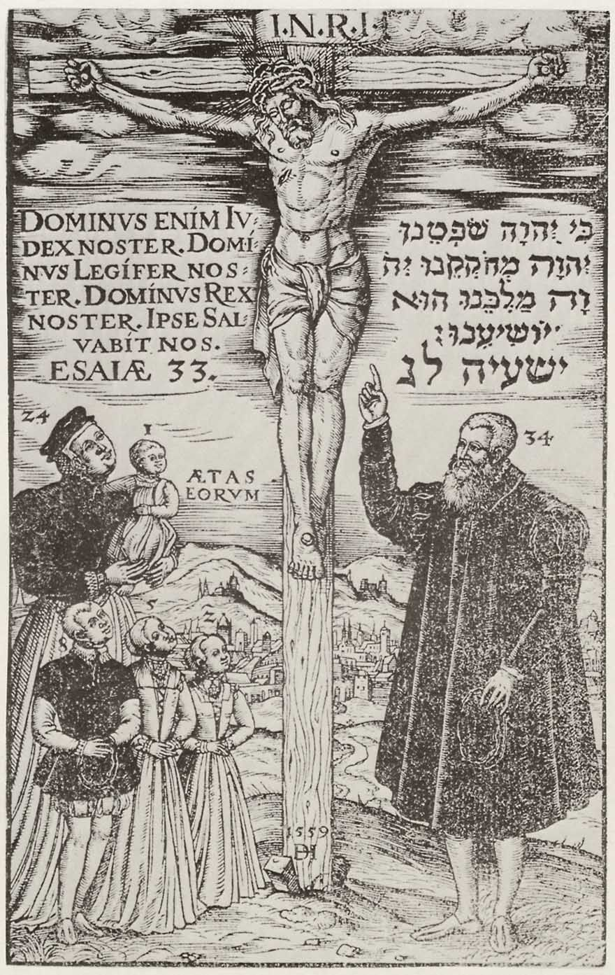 Christus am Kreuz angebetet von Dr. Paul Weidner und seiner Familie